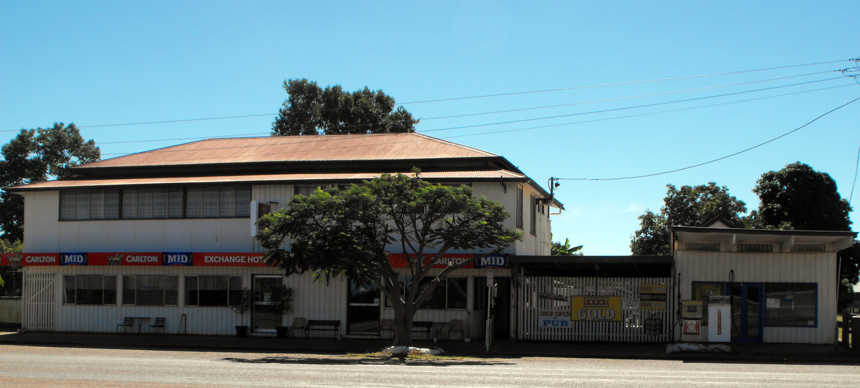 Exchange Hotel - Torrens Creek, Queensland